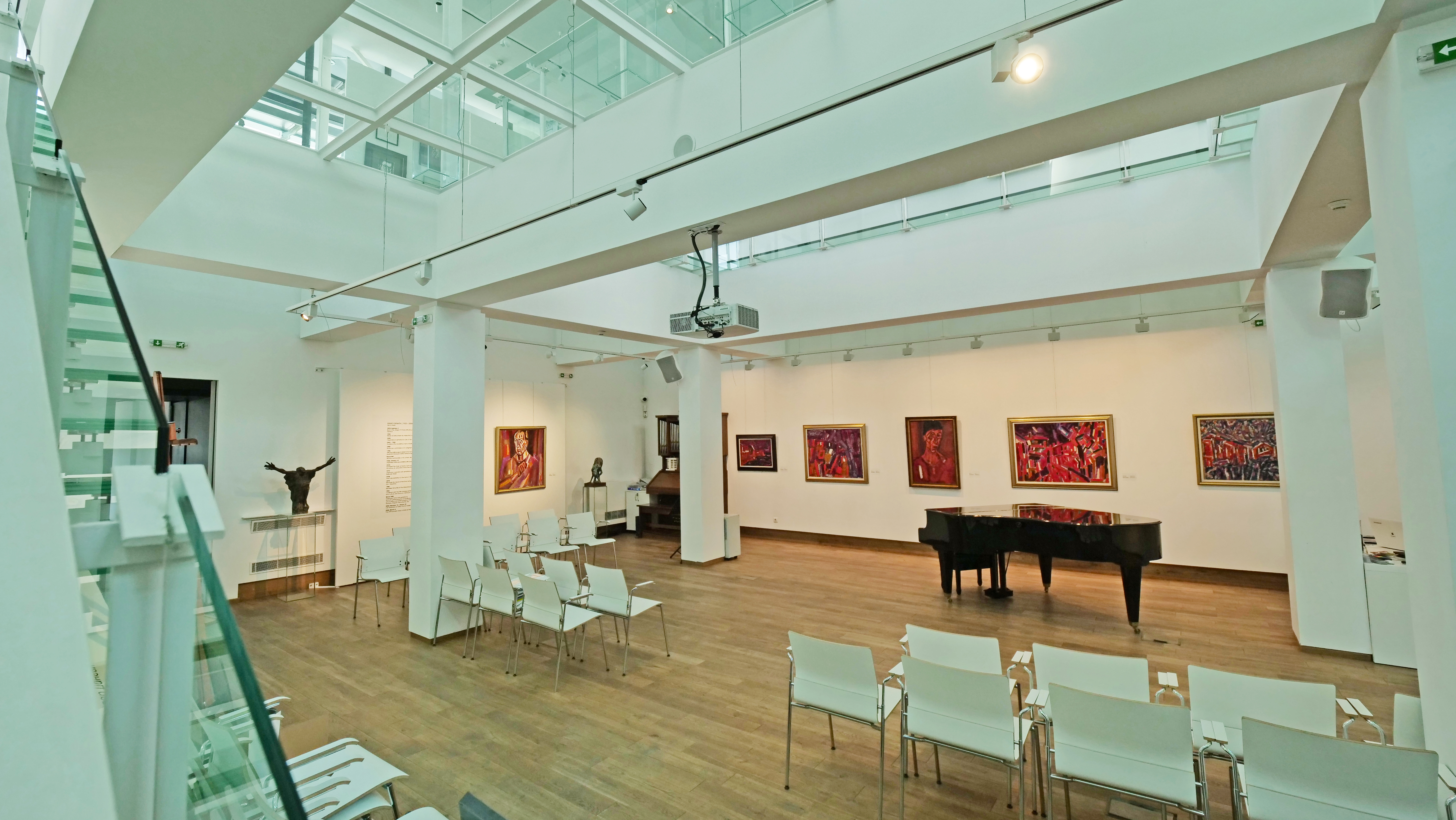 Студентите на НБУ и гостите на галерията могат да видят образци на класиката и старите майстори, да разработват свои проекти, да посещават семинари, да имат стажове и практики. Тук се провеждат разнообразни събития с академичен и културен характер – лекции, дипломни защити, литературни четения, представяния на книги, майсторски класове и камерни концерти, специални образователни програми.